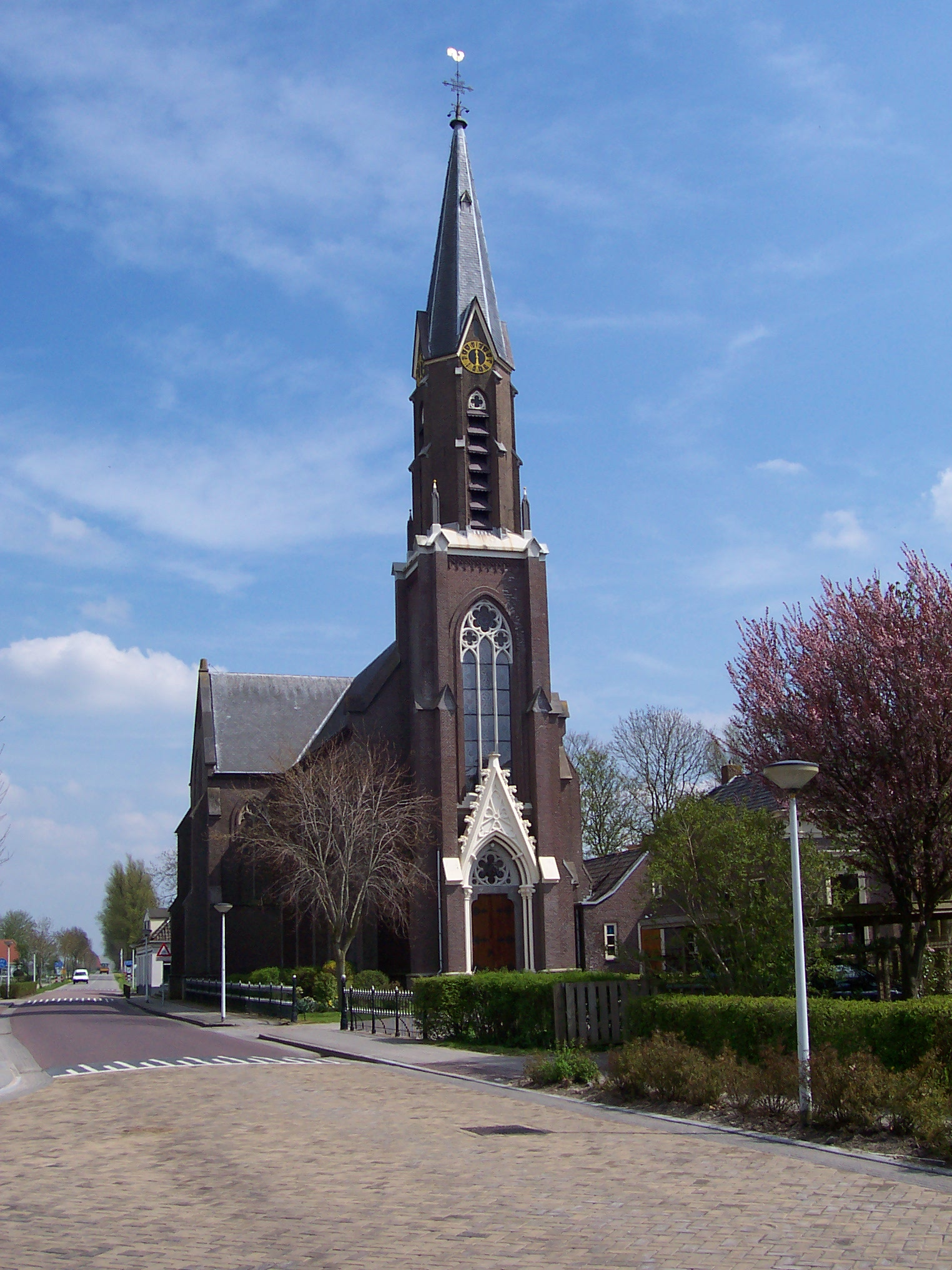 Wergea, Sint-Martinustsjerke